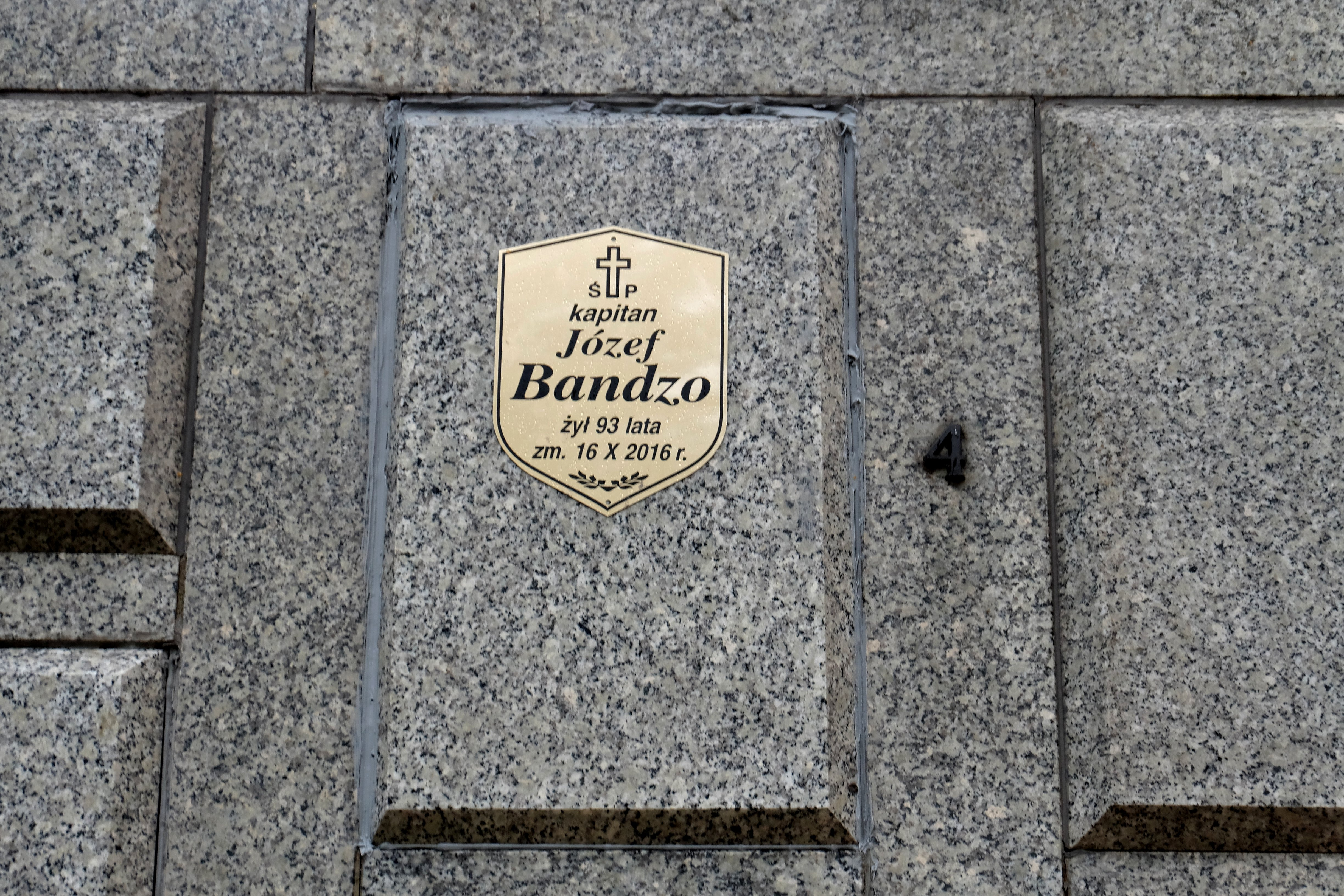 Grób działacza podziemia antykomunistycznego Józefa Bandzo na Cmentarzu Wojskowym na Powązkach w Warszawie